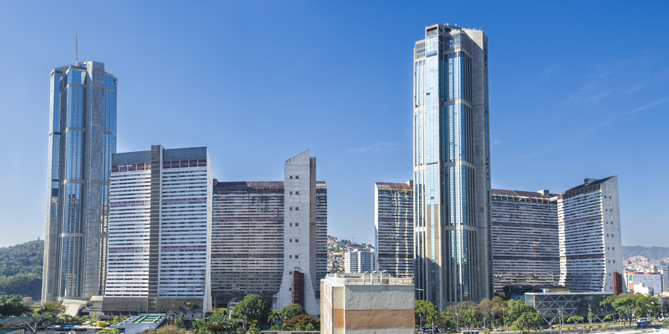 Edificios de Oficinas Conjunto Parque Central